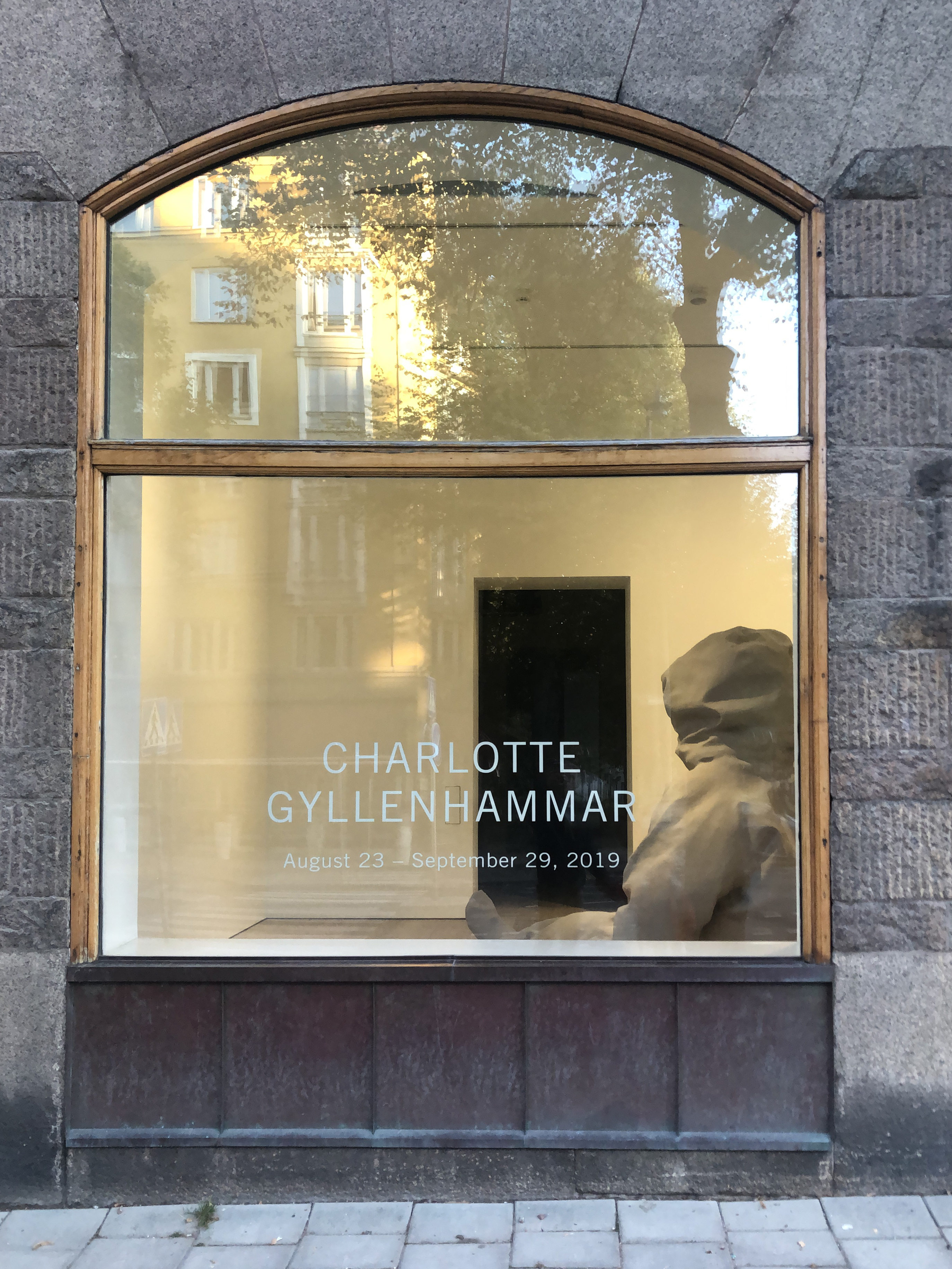 Galerie Forsblom Karlavägen 9 - Charlotte Gyllenhammar